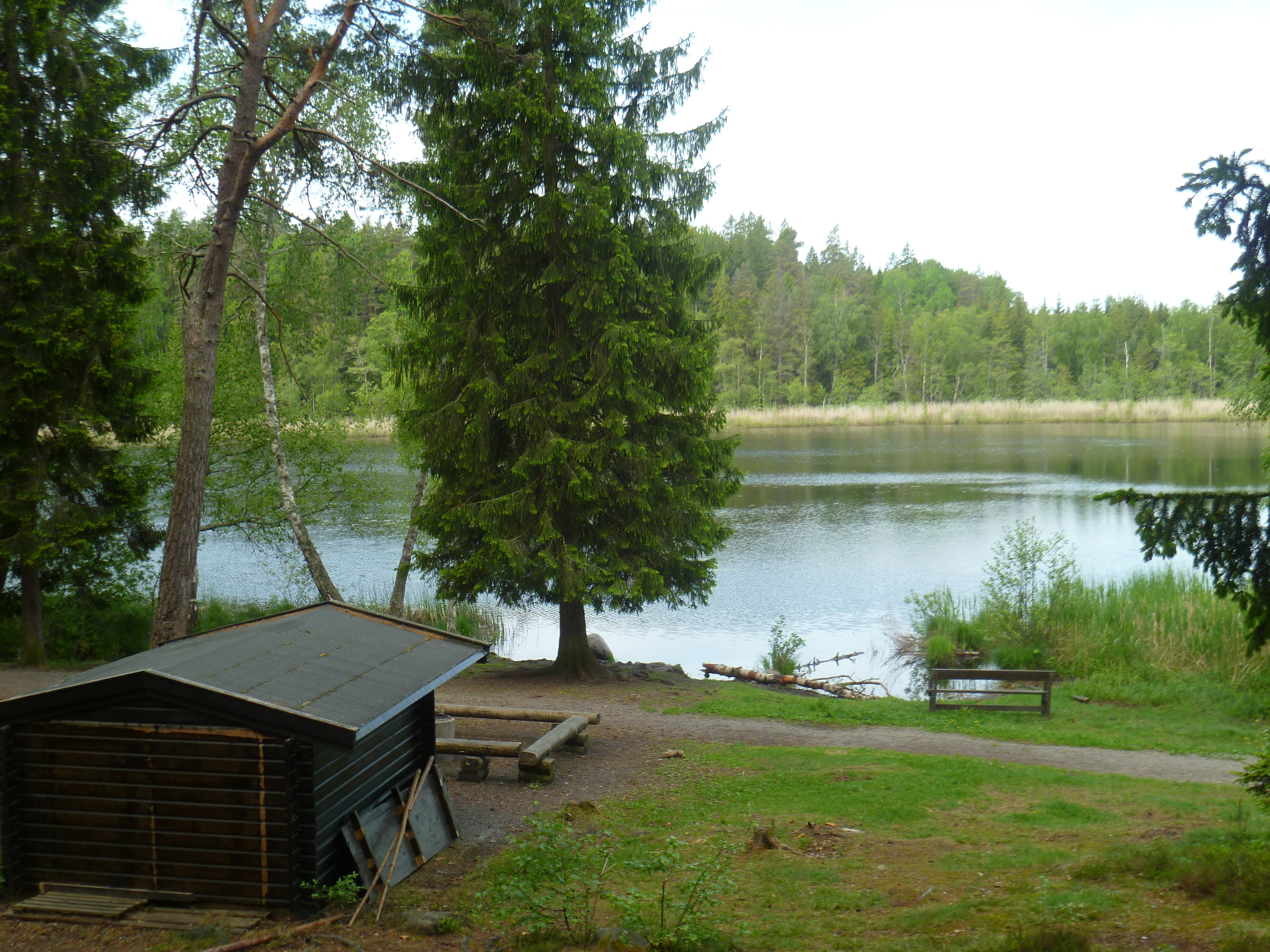 Gullsjön, Täby, från rastplatsen vid Roslagsleden